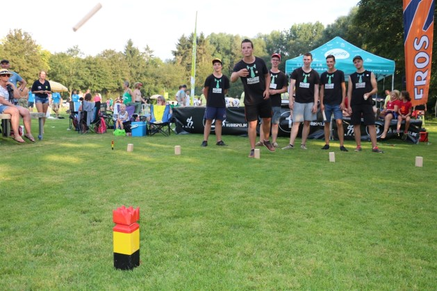 Belgisch Kampioenschap Kubb. Belgium Championship